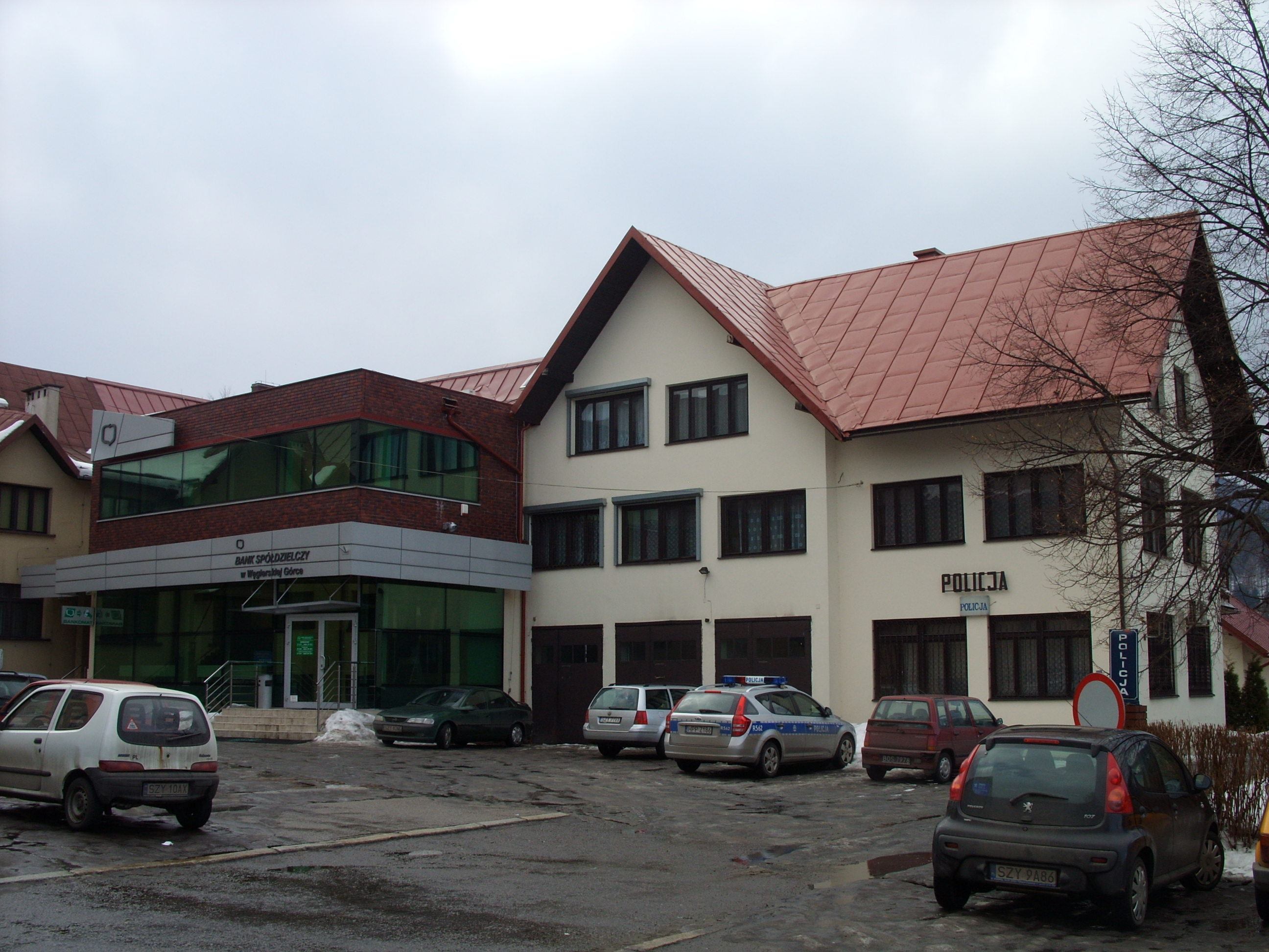 Bank Spółdzielczy w Węgierskiej Górce.